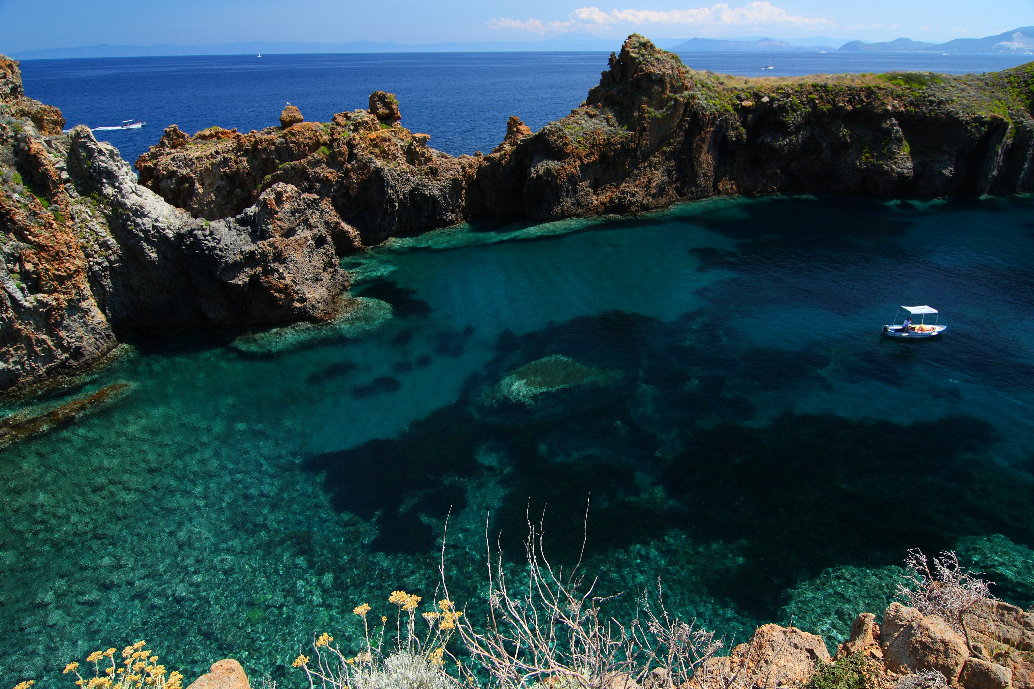 Punta milazzese, Cala Junco